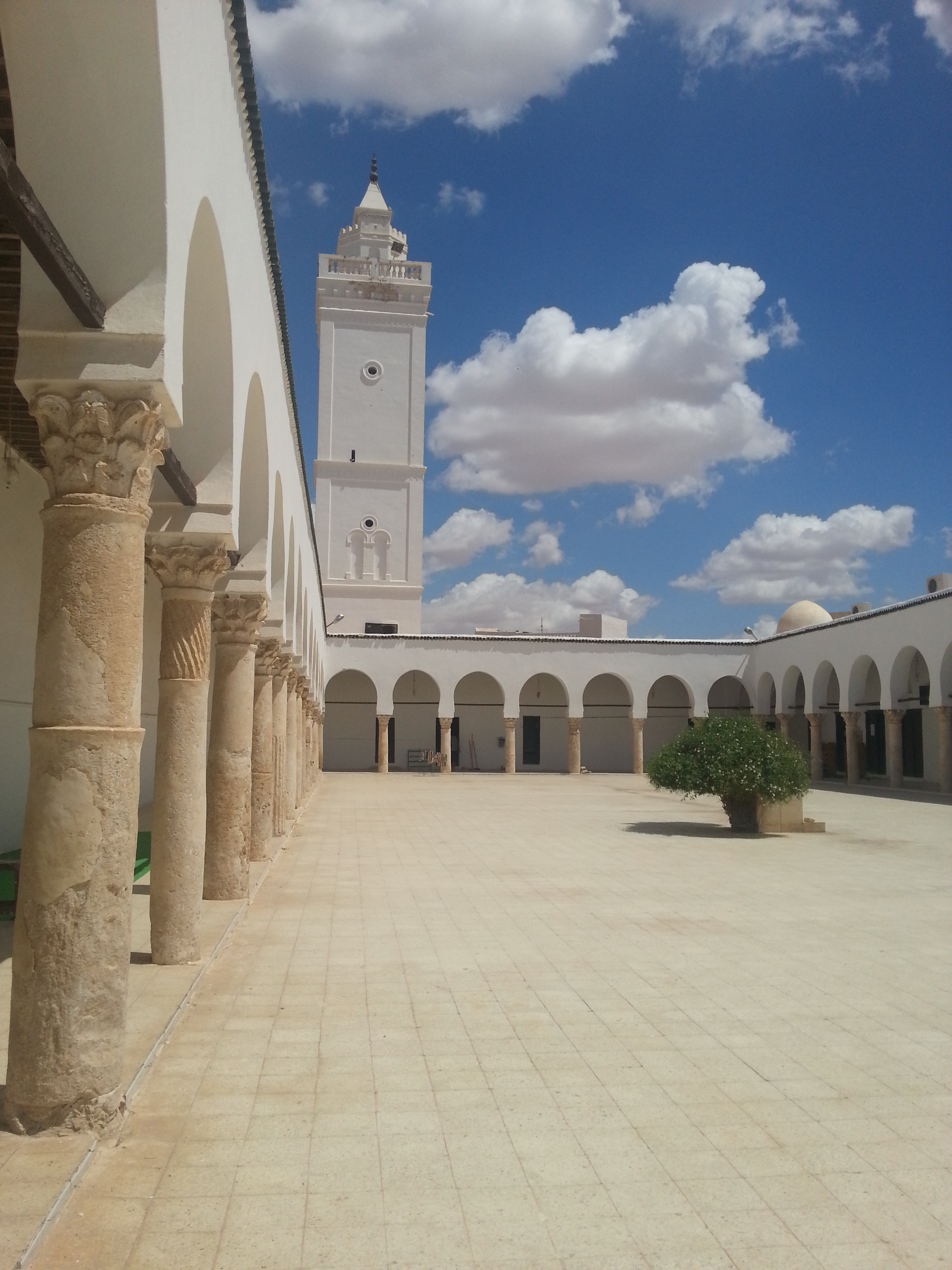 Grande mosquée, Gafsa